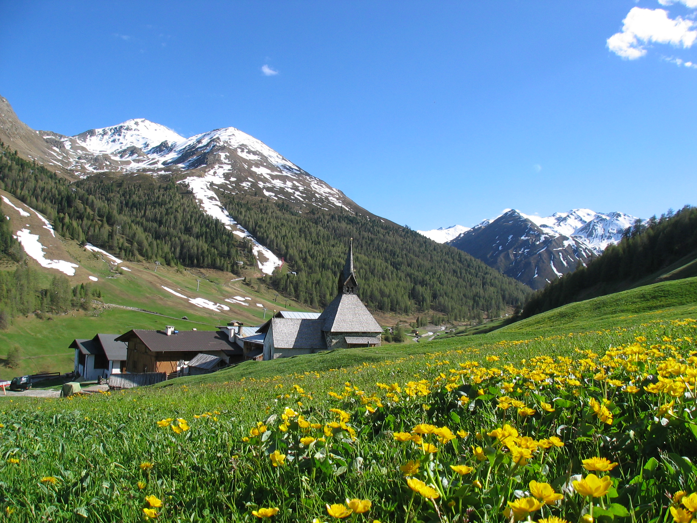 Weiler Rojen (Südtirol) mit der Kapelle zum Heiligen Nikolaus